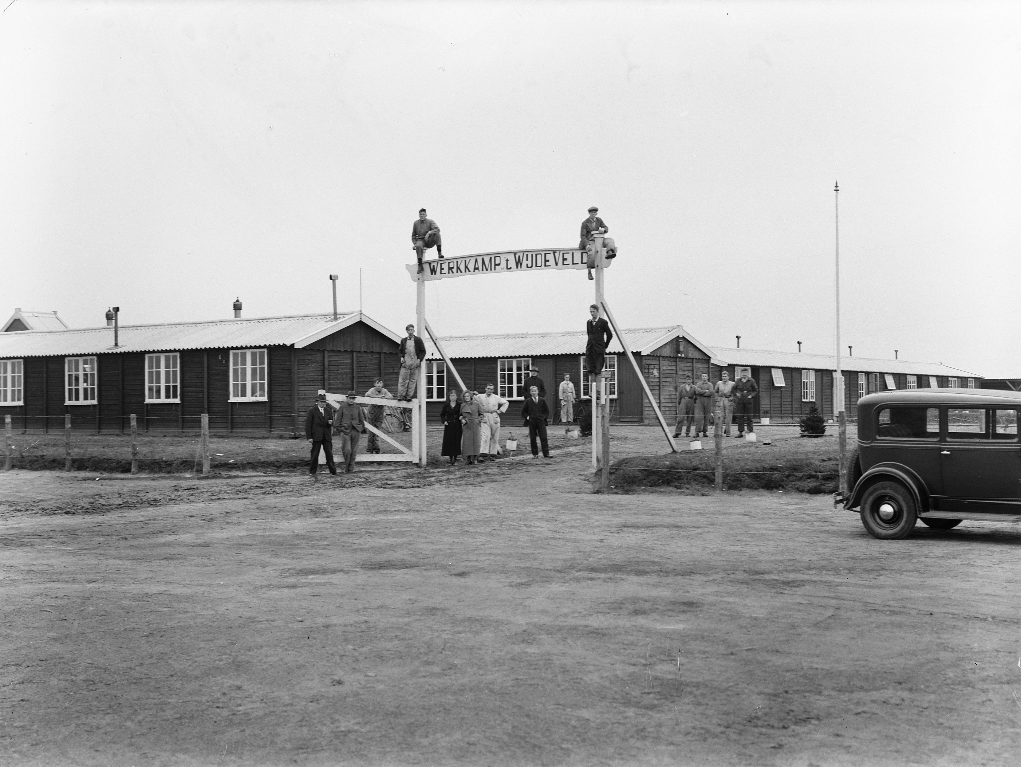 Collectie / Archief : Fotocollectie Nederlandse Heidemaatschappij Reportage / Serie : [ onbekend ] Beschrijving : werkkampen, overzichten, ingangen, mensen, t wijde veld Datum : ongedateerd Locatie : Ede Trefwoorden : ingangen, mensen, overzichten, werkkampen Persoonsnaam : t wijde veld Fotograaf : [onbekend] Auteursrechthebbende : Nationaal Archief Materiaalsoort : Glasnegatief Nummer archiefinventaris : bekijk toegang 2.24.06.02 Bestanddeelnummer : 162-1351